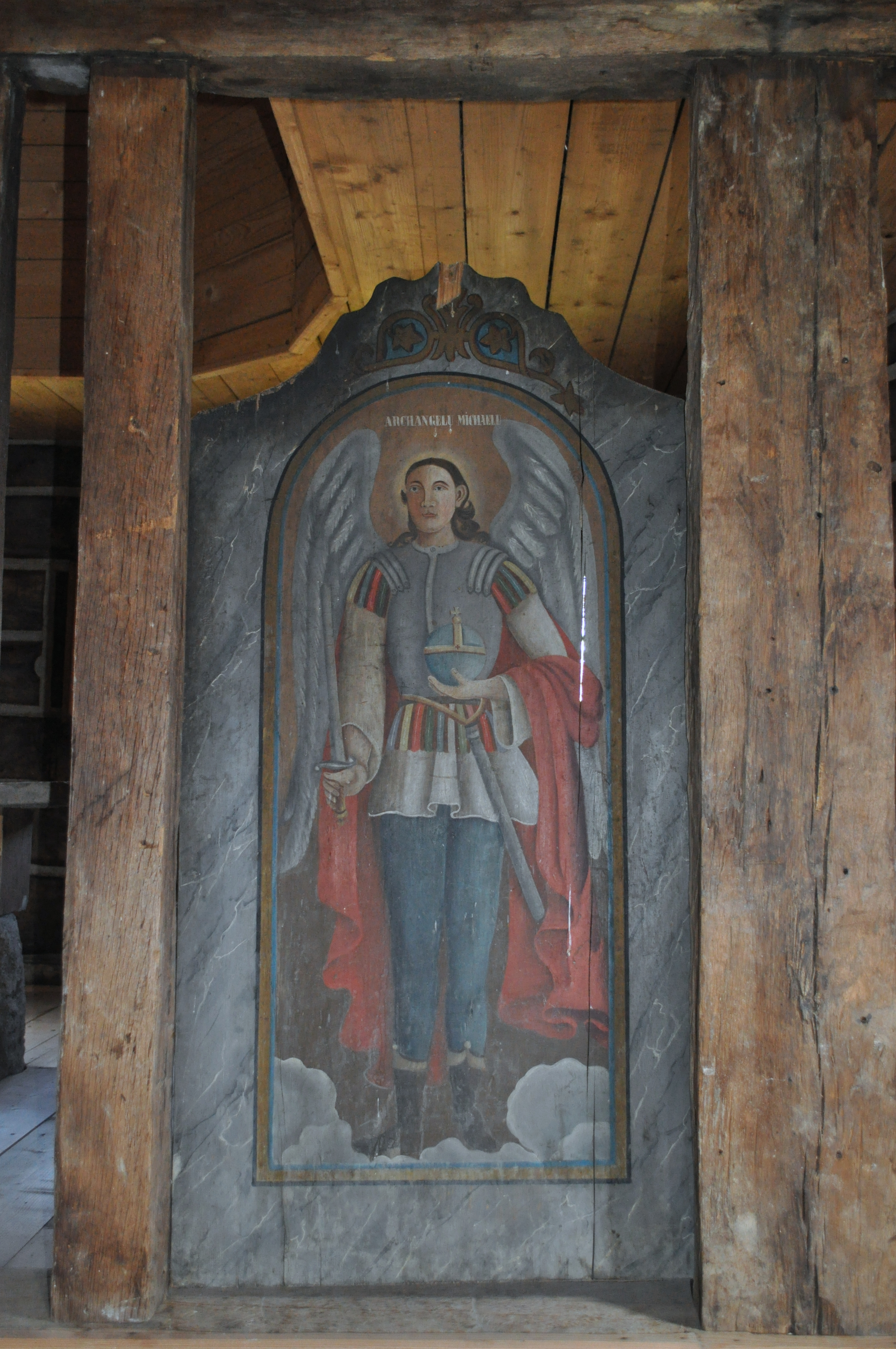 Biserica de lemn "Întâmpinarea Domnului", sat GROŞII NOI; comuna BÂRZAVA